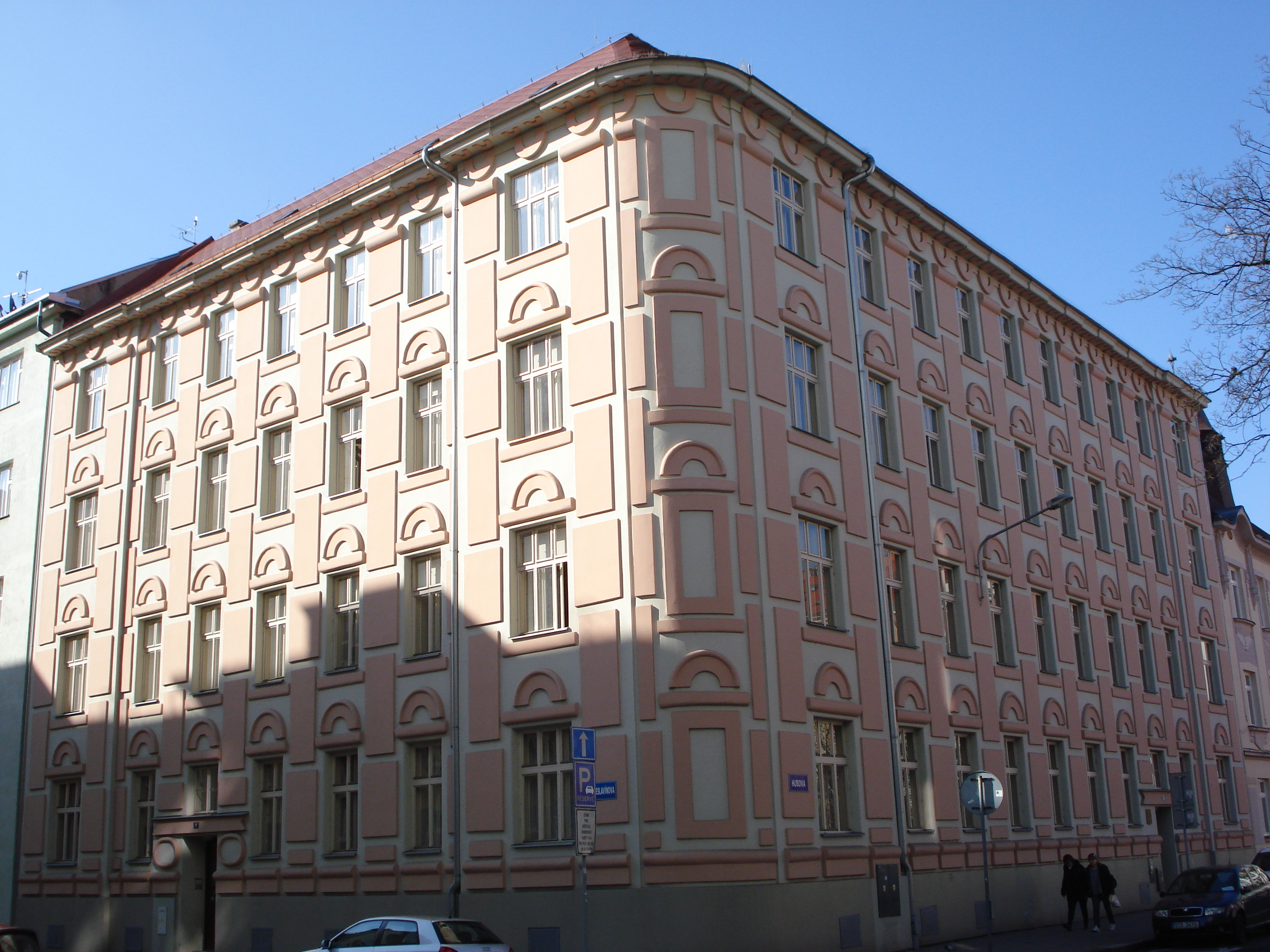 Původní administrativní budova těžební společnosti SDF. Postavila firma Rozhon, fasádu navrhl architekt Pavel Jandák.